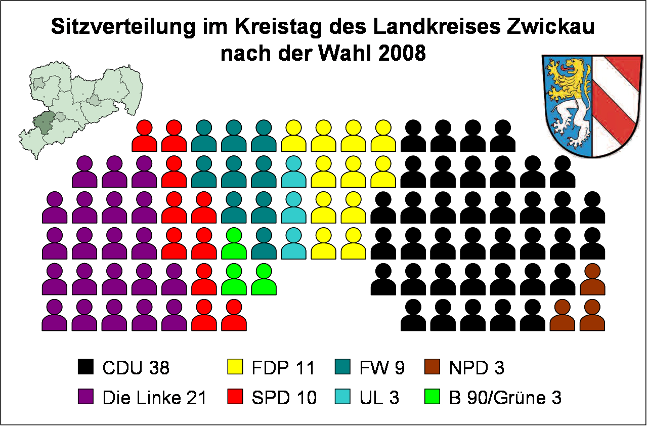 Sitzverteilung im Kreistag des Landkreises Zwickau nach der Wahl vom 8. Juni 2008